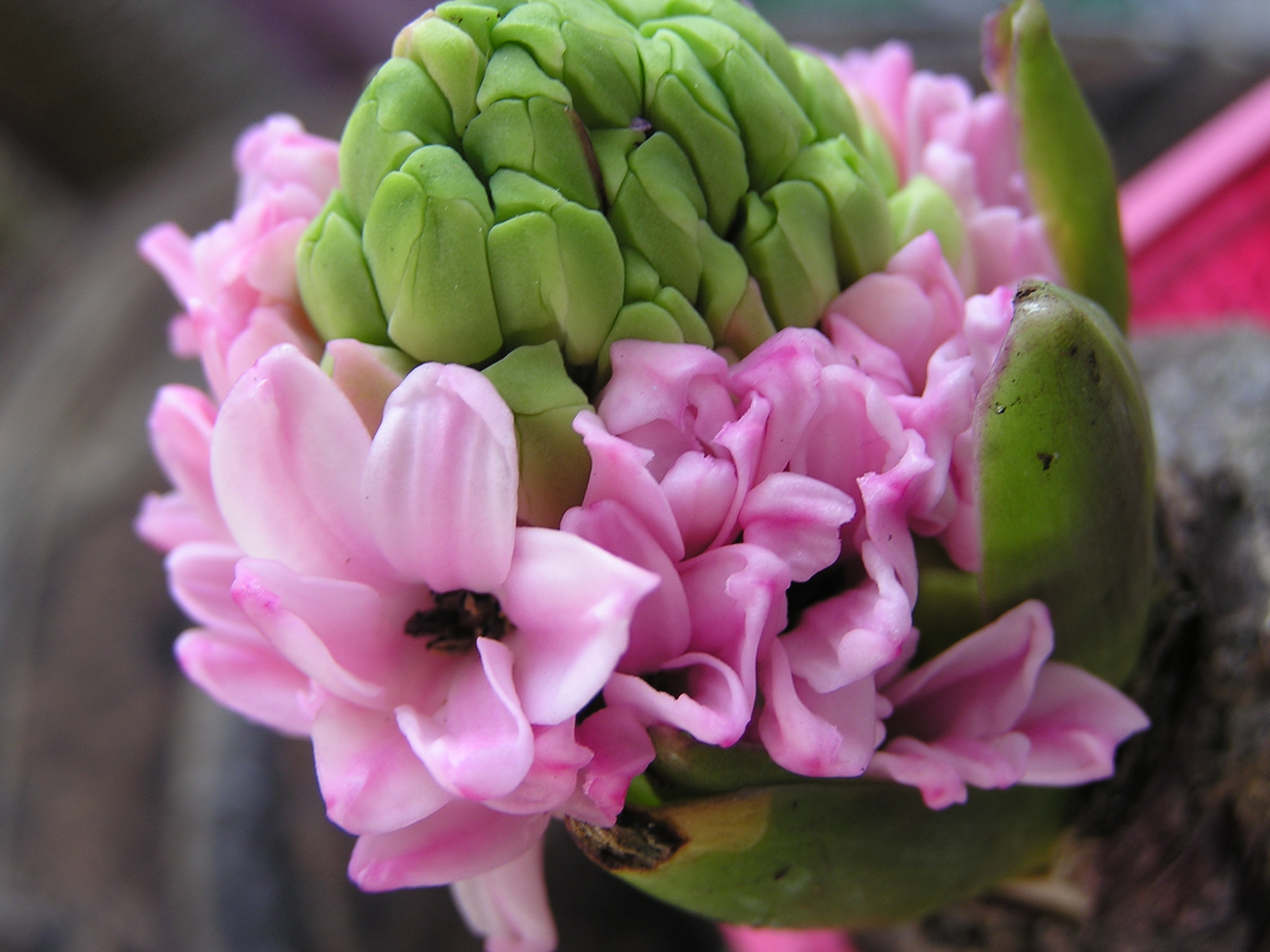 Растение